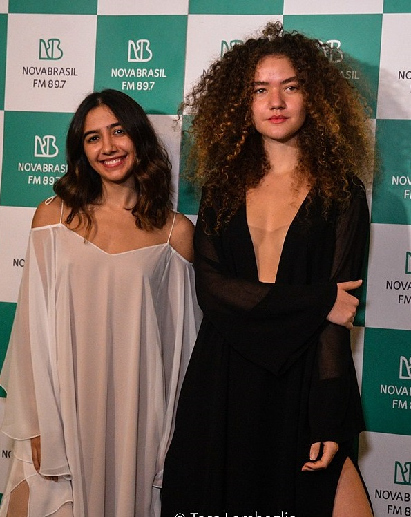 Duo Anavitória em passagem pelo Festival NovaBrasil em 2018